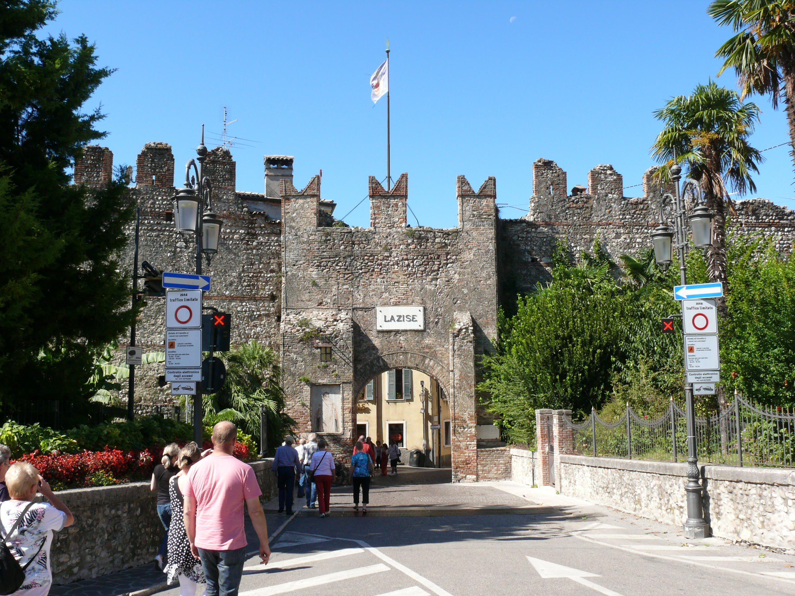 Stadtmauer von Lazise